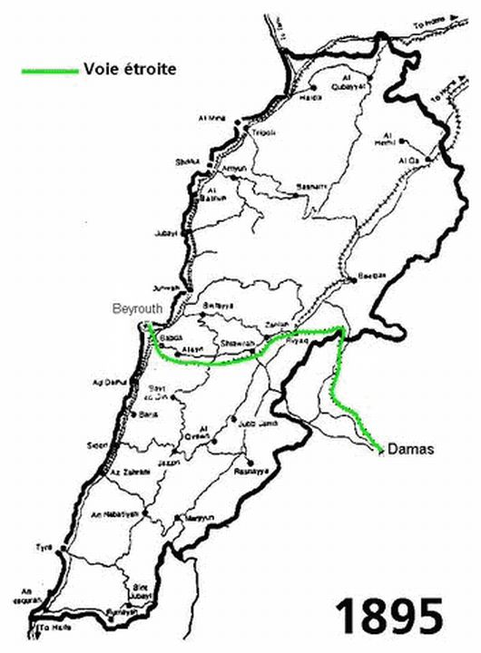 Carte du réseau ferré libanais en 1895